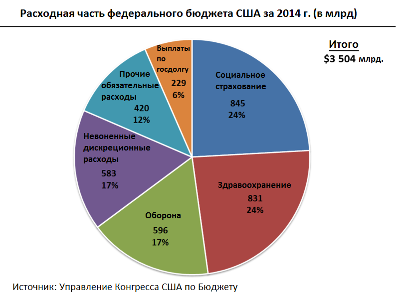 Федеральный бюджет США за 2014 г.